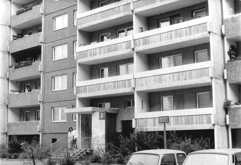 ADN-Franke-20-11.6.90-Berlin: RAF- Die Rosenbecker Straße Nr. 3 in der Satellitenstadt Marzahn unterscheidet sich rein äußerlich nicht von den umgebenen Straßenzügen. Nur wurde hier am Mittwoch der vergangenen Woche die mutmaßliche RAF-Terroristin Susanne Albrecht festgenommen und die Adresse rückte ins Licht der Weltöffentlichkeit. Seit 1989 wohnte die seit Jahren gsuchte Extremistin unter dem Namen Ingrid Jäger unerkannt mit Mann und Kind in der 2. Etage, rechts.